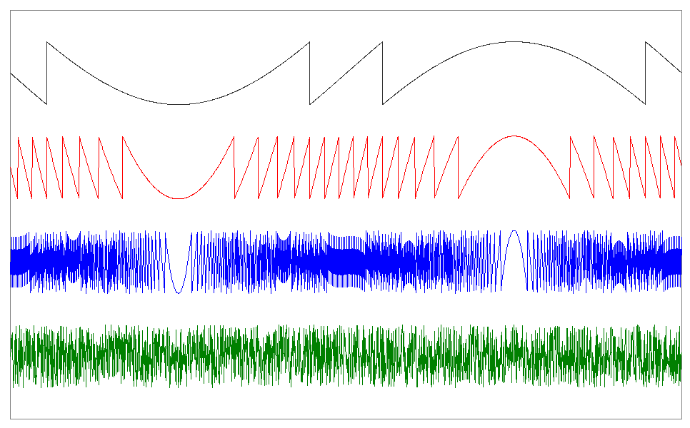 Ruido de Cuantificación según su relación SQNR